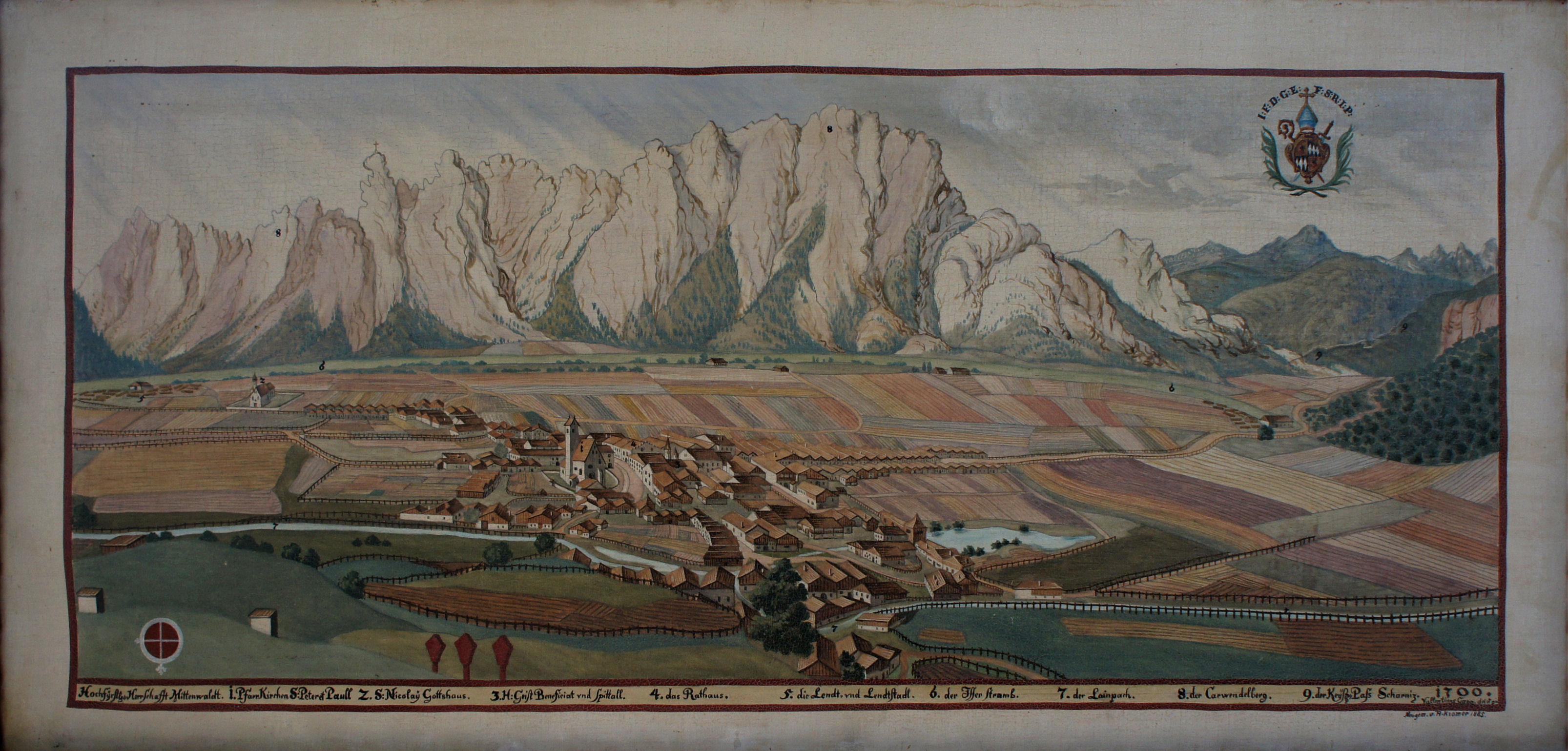 Gemälde aus einer Serie mit Darstellungen von Besitztümern des Hochstifts Freising im Fürstengang zwischen Fürstbischöflicher Residenz und Freisinger Dom.